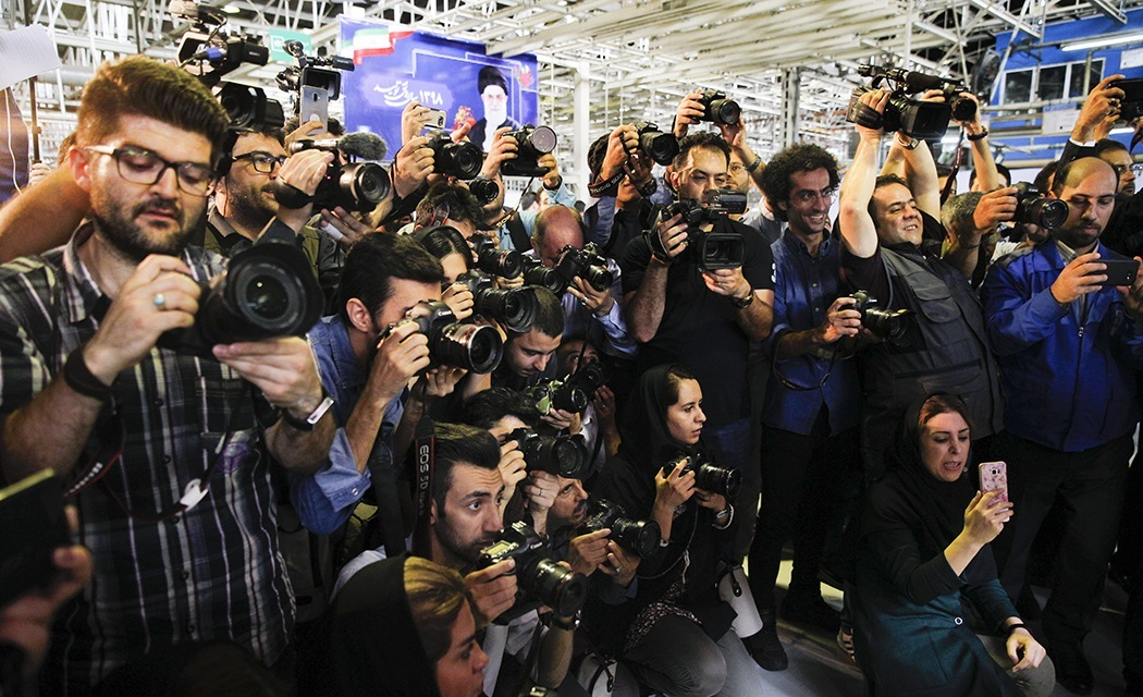 خبرنگاران ایرانی